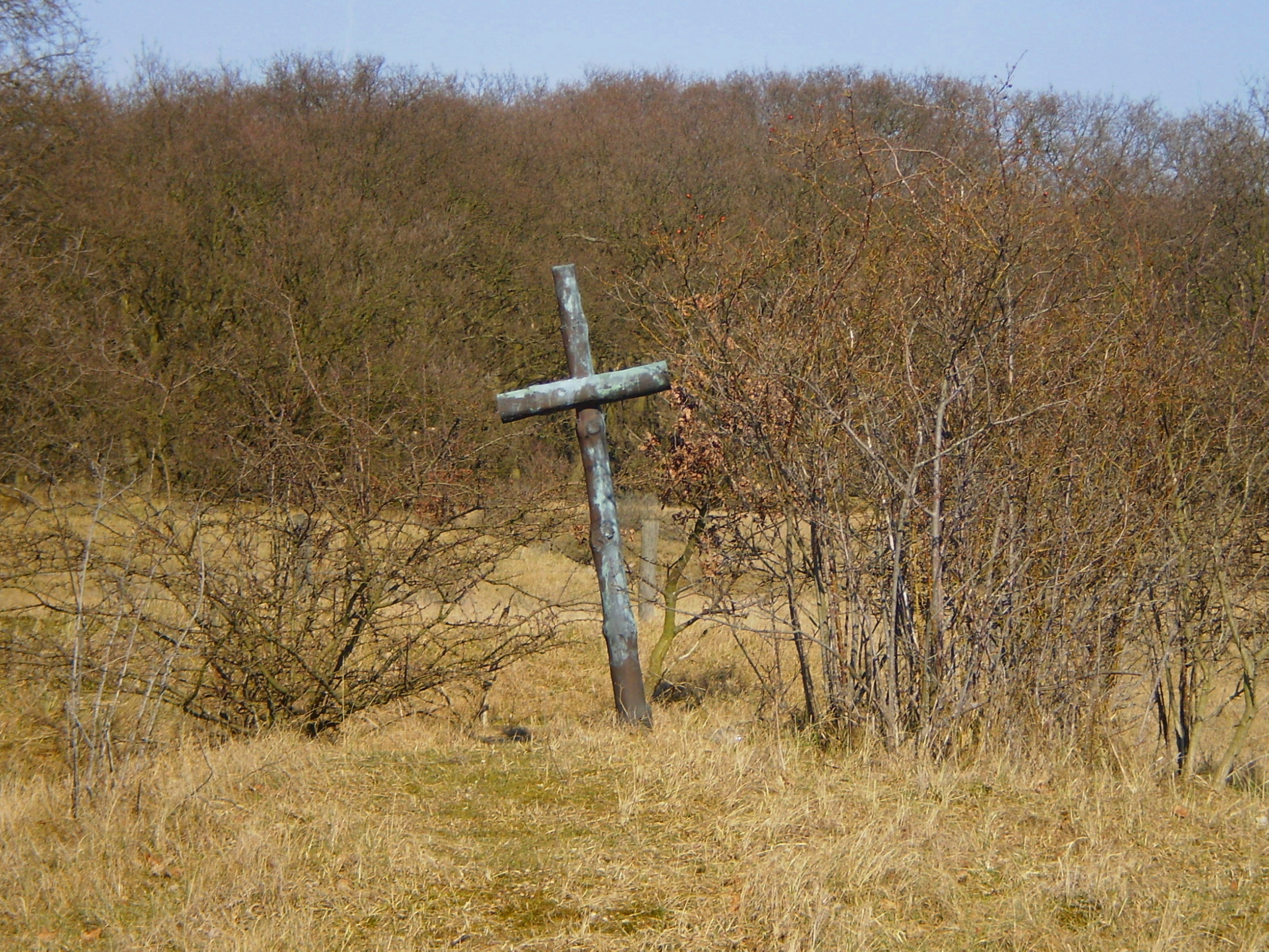 Het zogenaamde Rauterkruis op de Waalsdorpervlakte, ter nagedachtenis aan de 38 slachtoffers van de massa-executie daar op 8 maart 1945, als represaille voor de Aanslag op Hanns Rauter.[1]